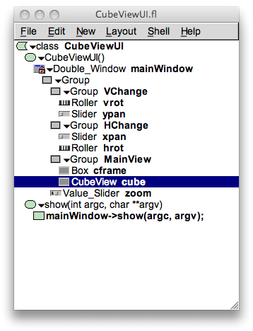 Captura de pantalla del programa de desarrollo de interfaz gráfica FLUID para crear ventanas basadas en la librería de widgets FLTK.